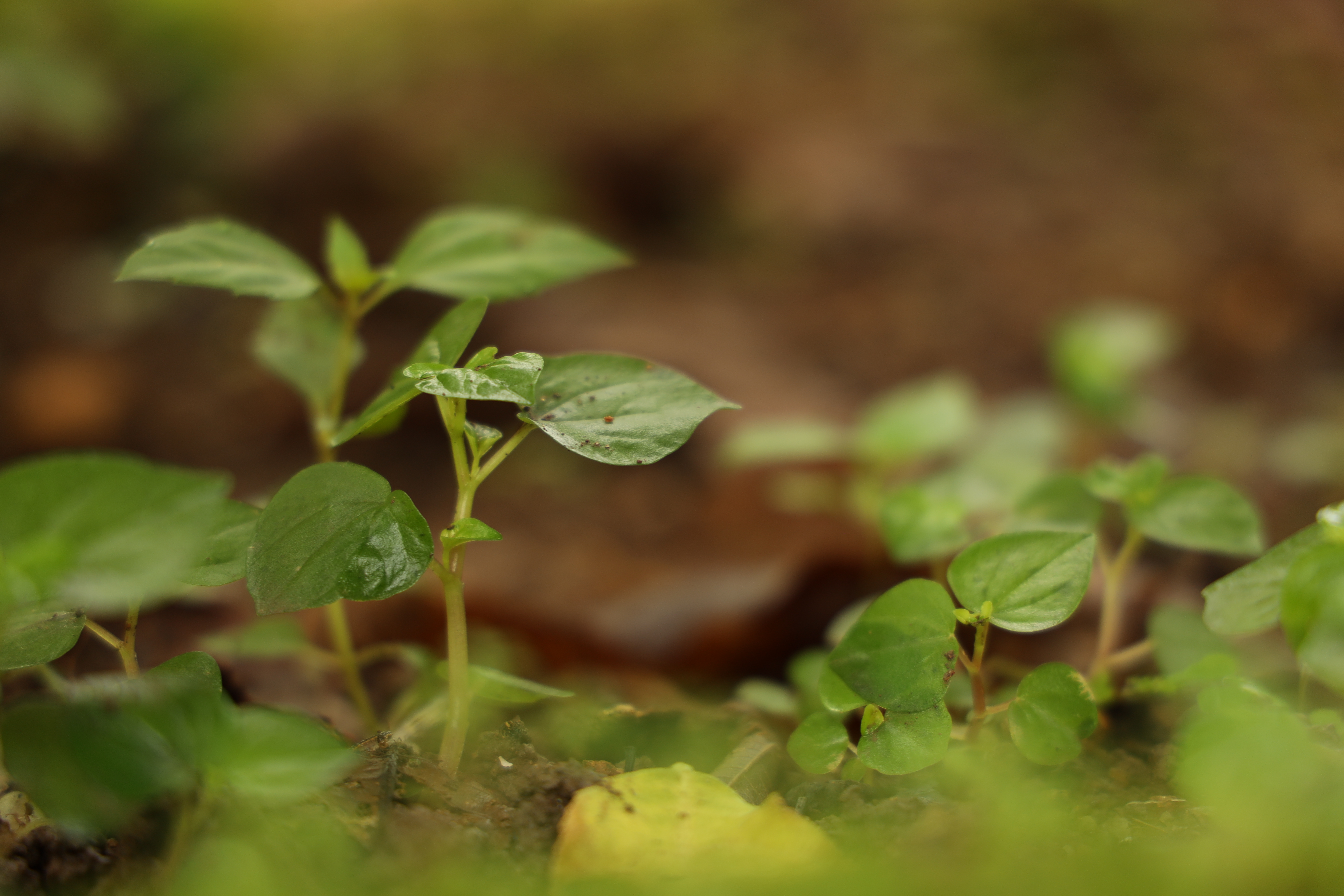 ഒരു ഔഷധ ചെടി